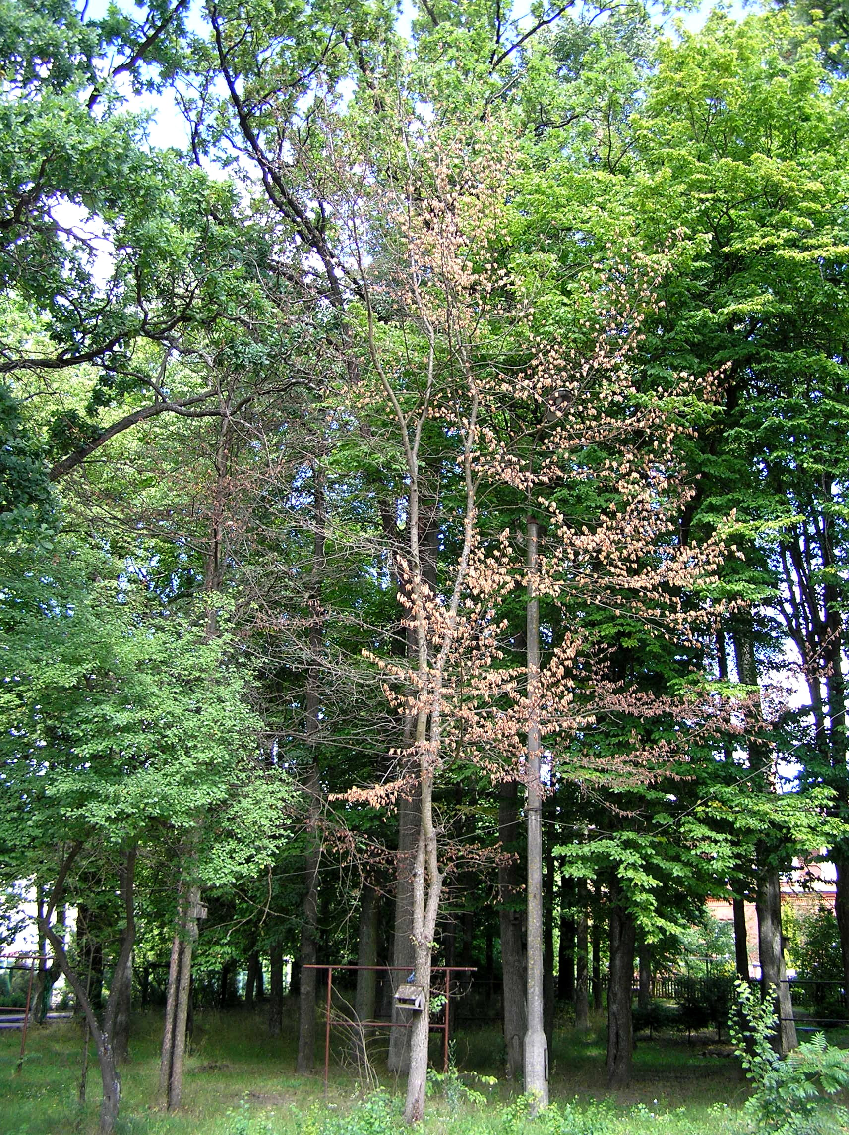 Ceratocystis ulmi = Ophiostoma ulmi, symptom grafiozy wiązu, Białowieża, Polska